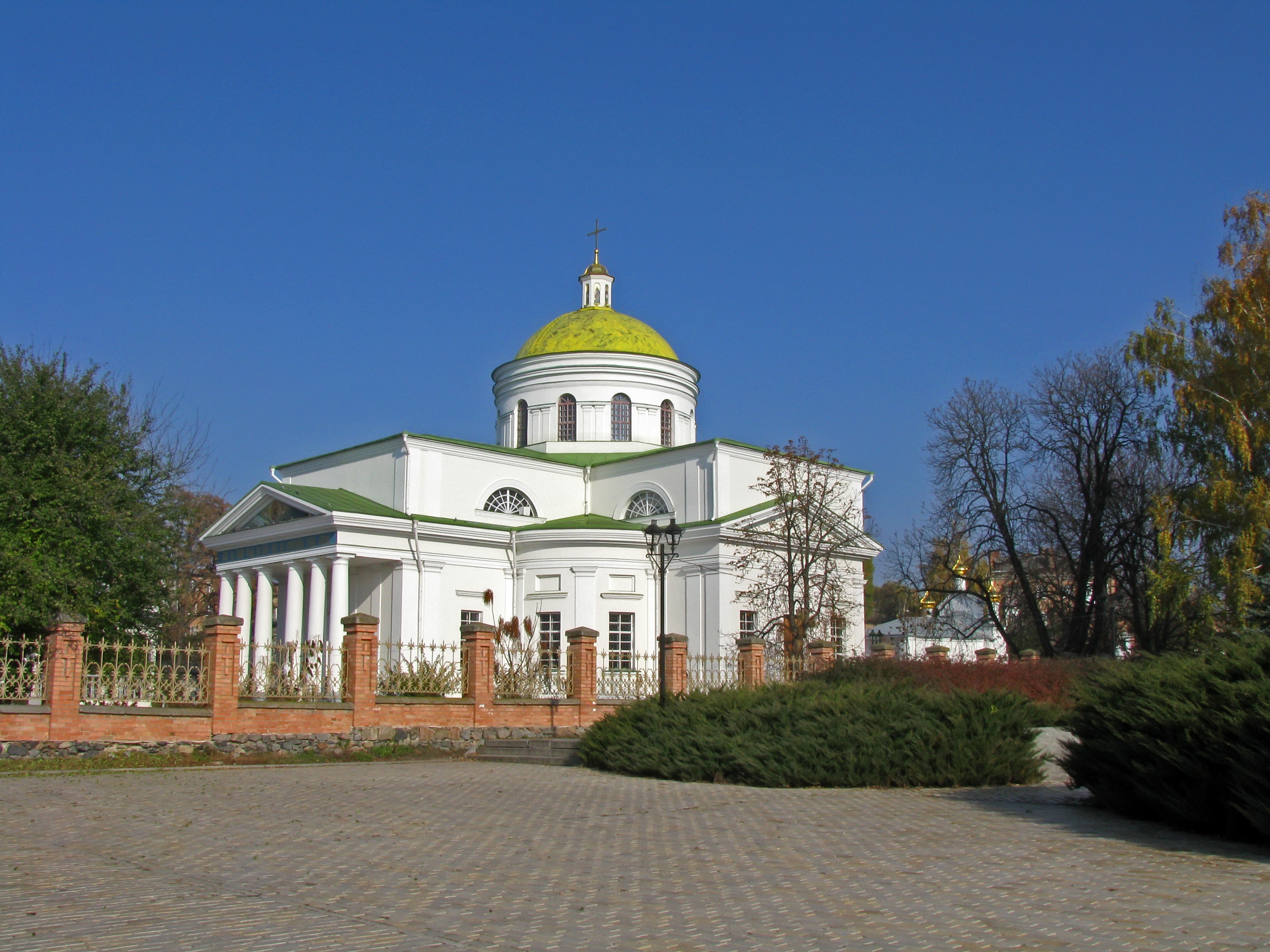 Спасо-Преображенський собор (мур.), Біла Церква, вул.Гагаріна, 10